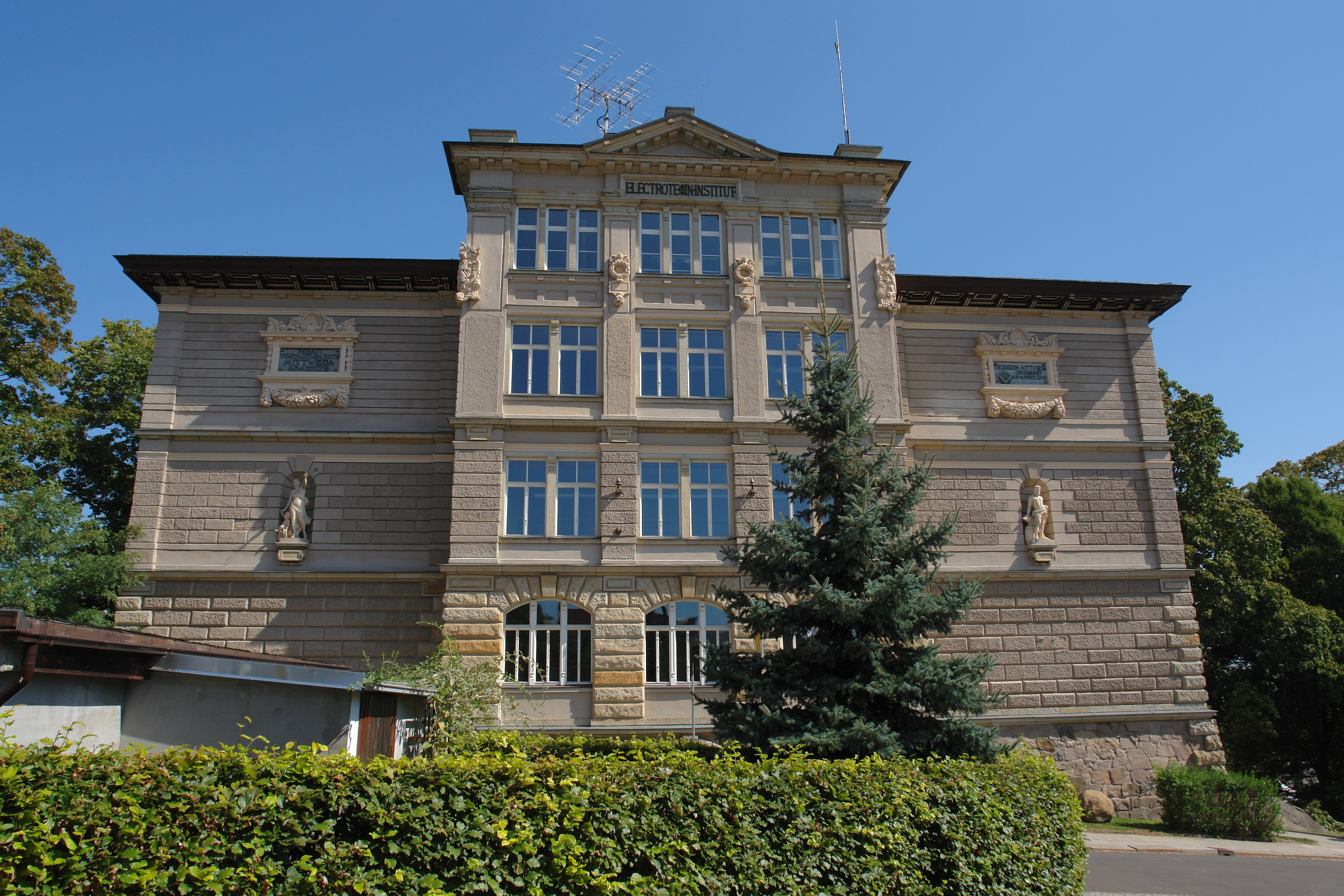 Hochschule für Technik und Wirtschaft Mittweida Haus 2 Alfred-Udo-Holzt Bau